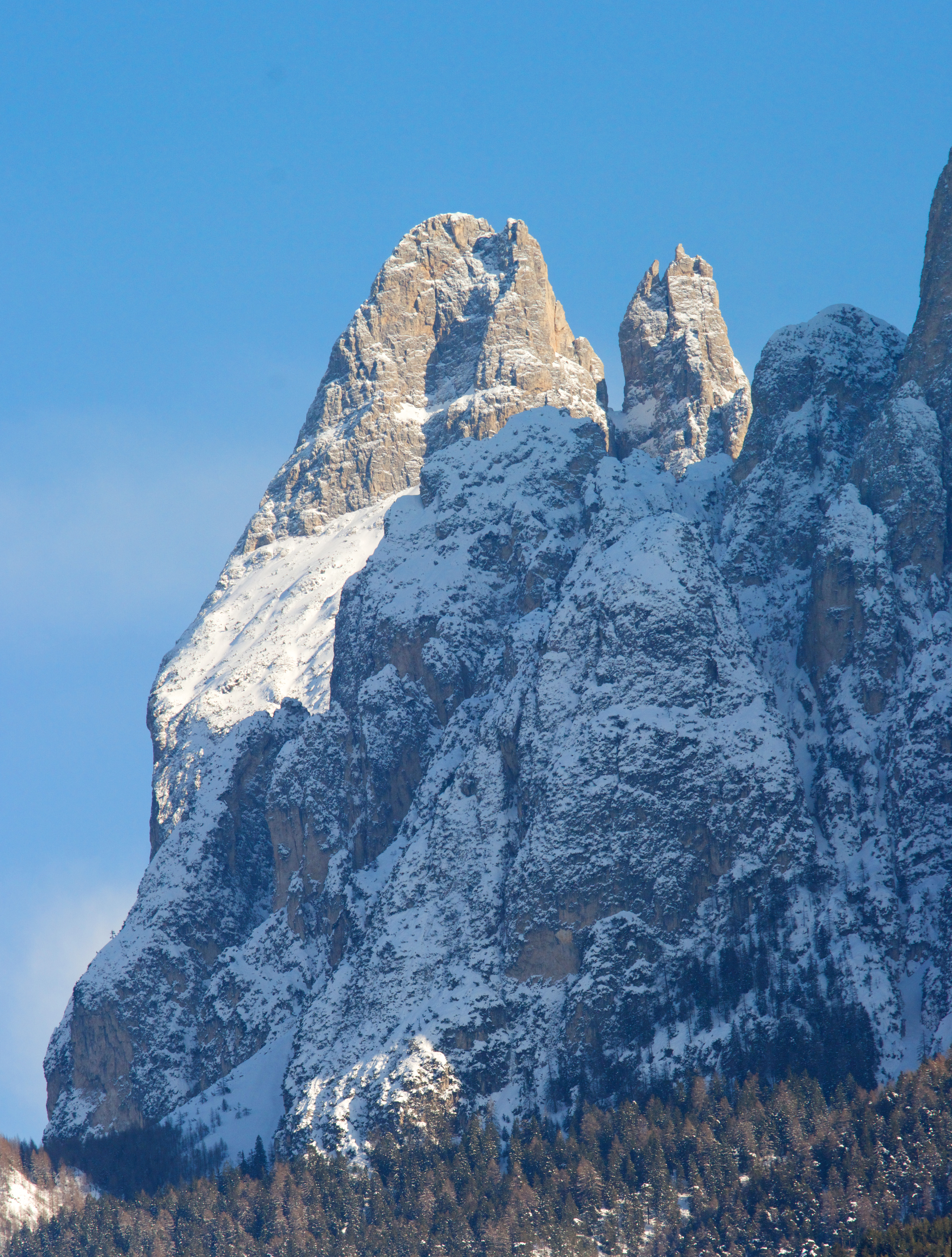 Euringer- und Santnerspitze von Westen